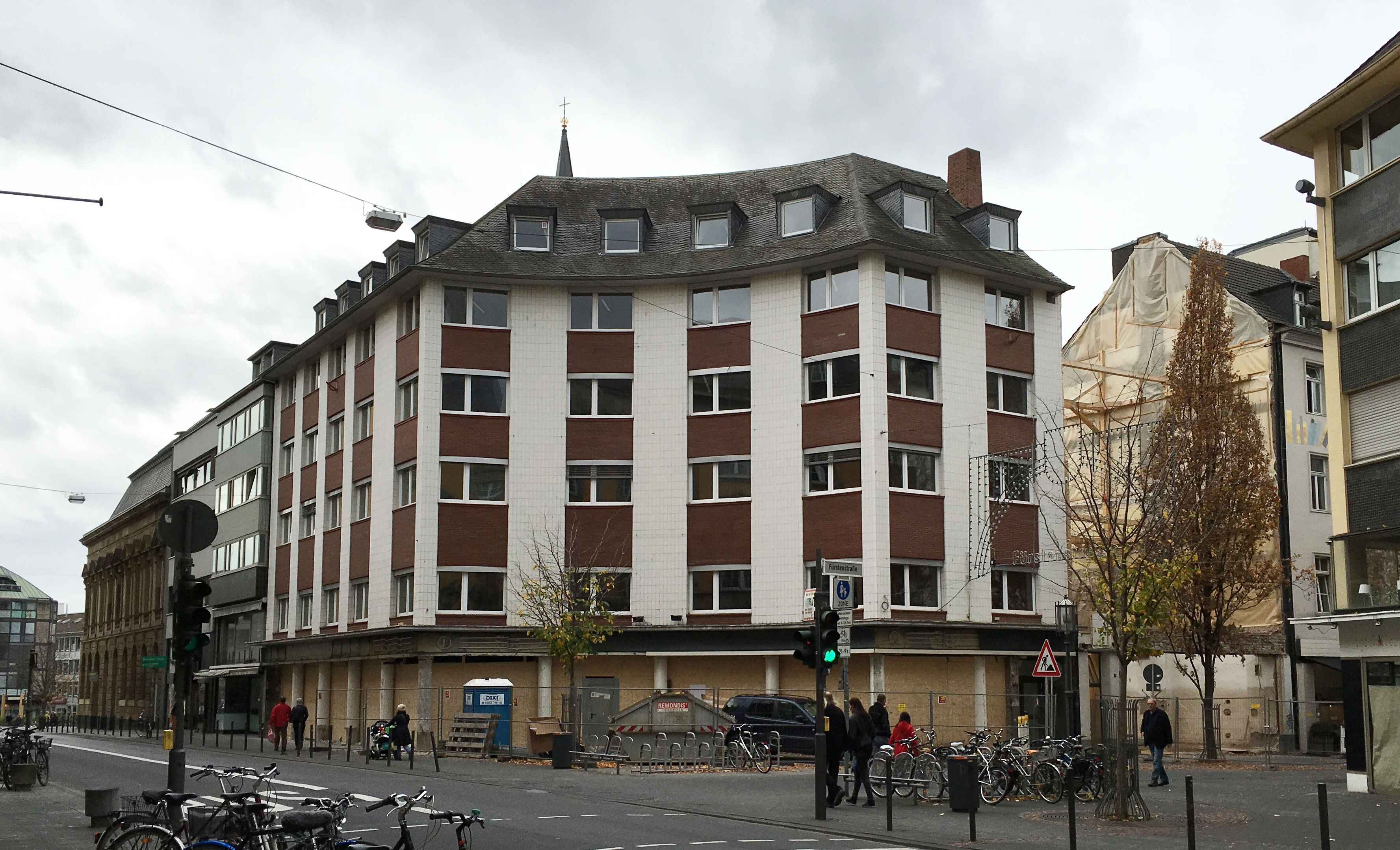 Bonn (Nordrhein-Westfalen); Am Hof/Ecke Fürstenstraße: ehemalige Universitätsbuchhandlung Bouvier; Umbau zu einem Gastronomiebetrieb